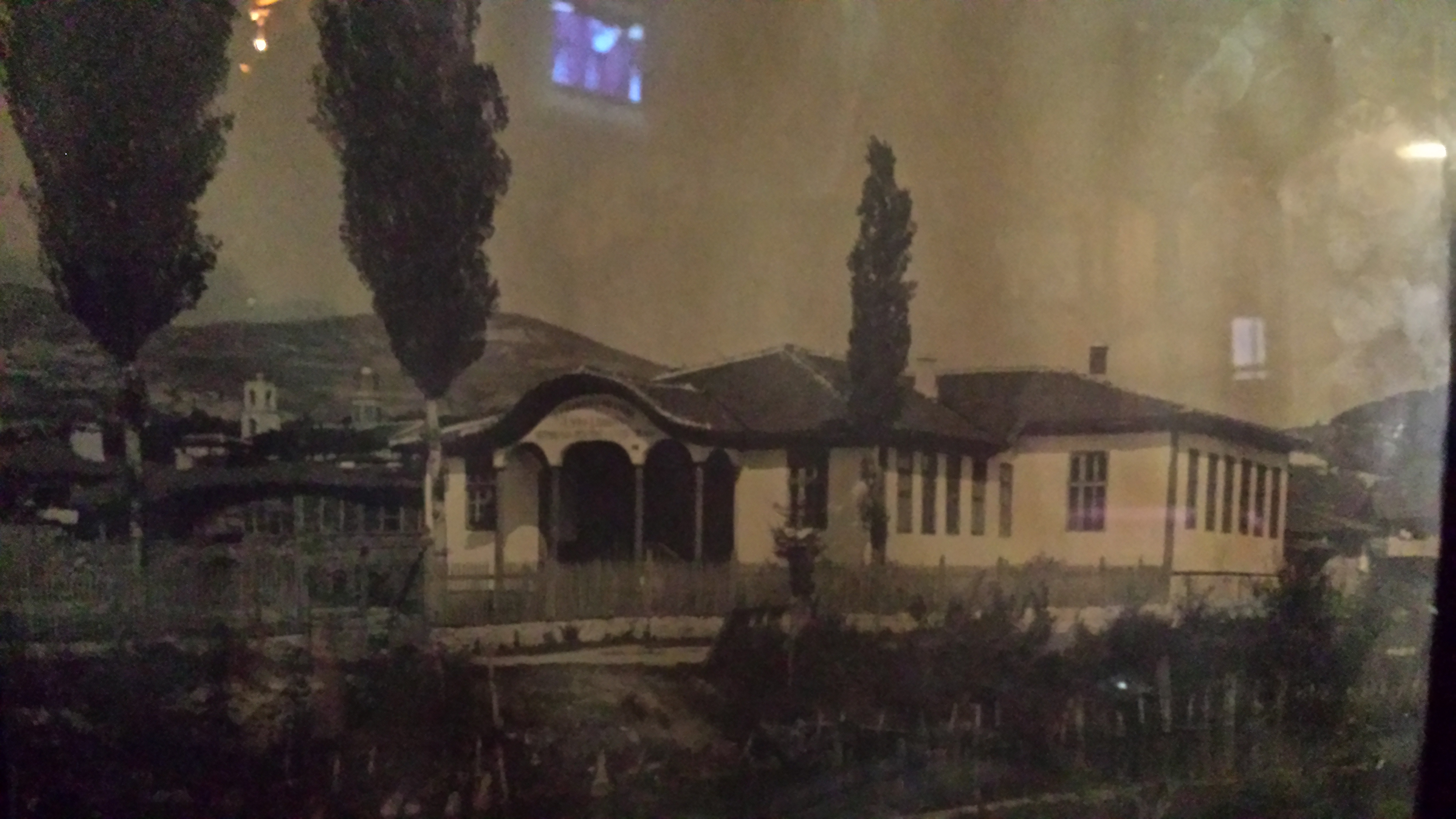 Копривщица - тридесетте години на двадесети век